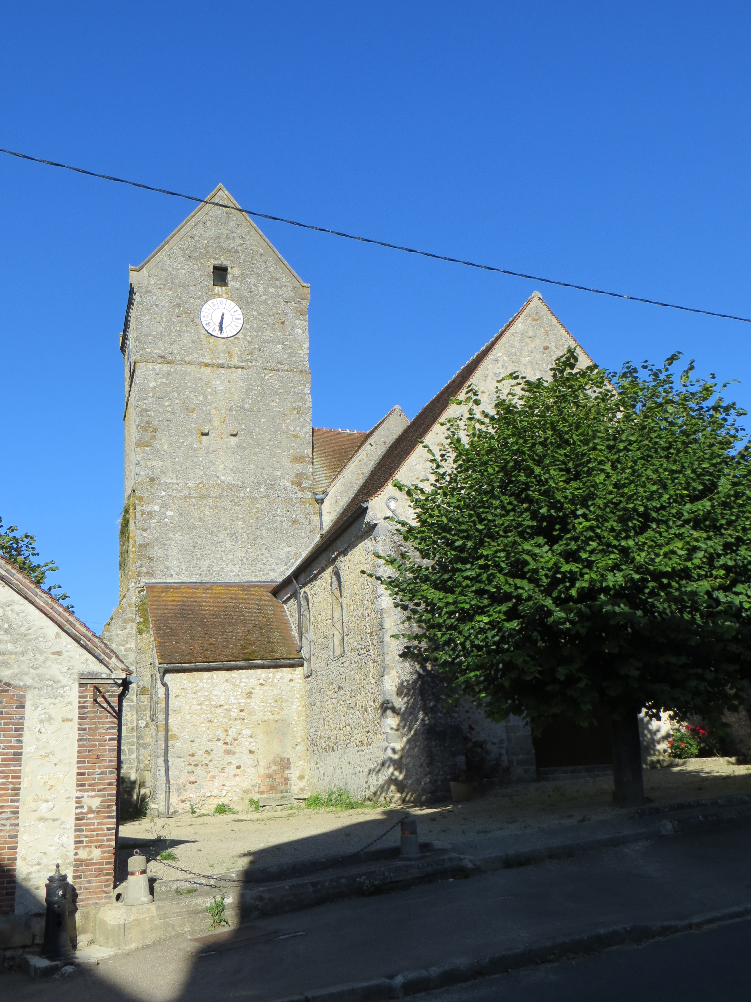 Vue générale de l'église